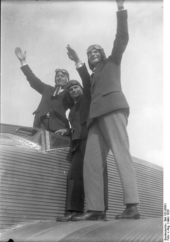 Deutsche Piloten wollen zum Ozeanflug starten! Die Junkersflieger Köhl und Loose sowie ein Begleiter , Baron von Hünefeld, wollen es trotz der bisher misslungenen Ozeanflüge wagen denselben mit einer Junkersmaschine zu überfliegen. Die Probeflüge haben in Berlin-Tempelhof bereits zur Befriedigung stattgefunden.